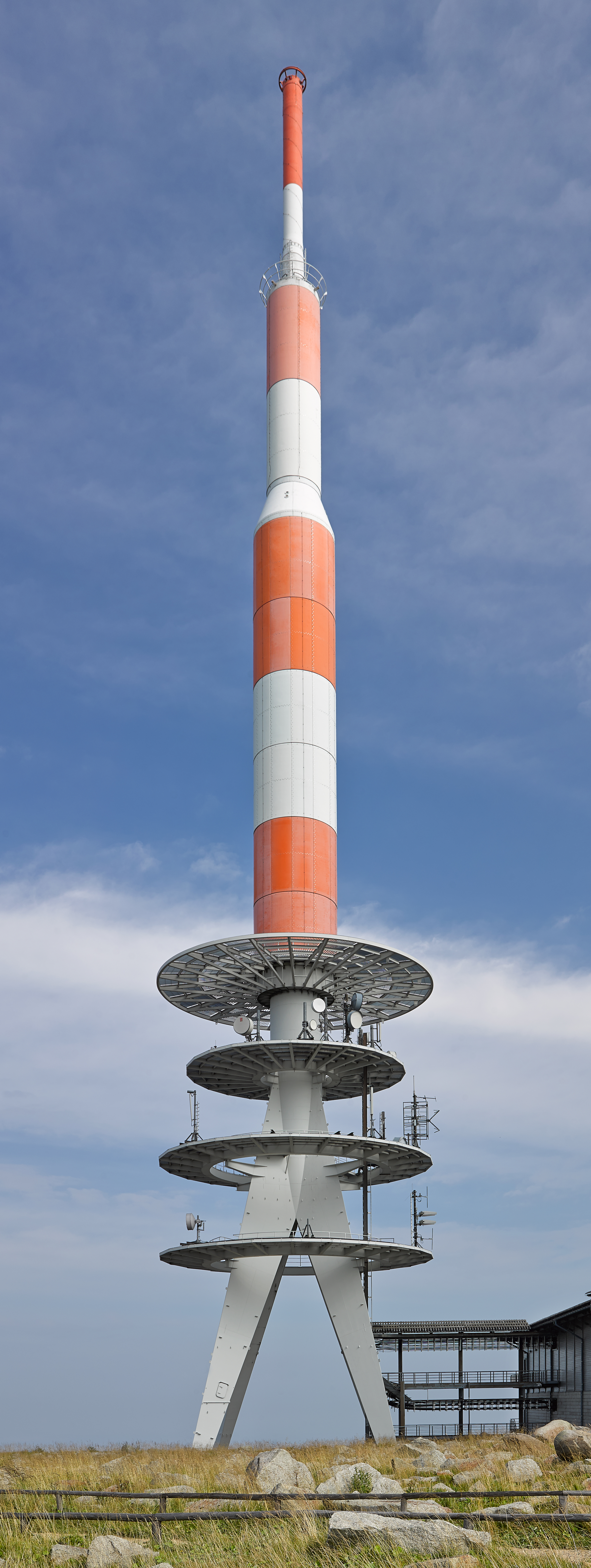 Neuer Sendeturm Brocken